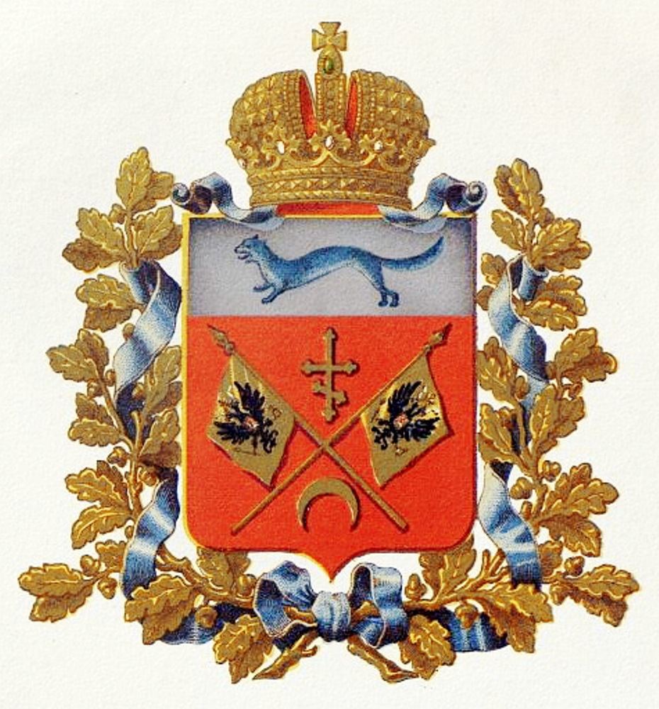 Official Russian Empire coat of arms Orenburg Governorate. Герб Российской Империи Оренбургской губернии с официальным описанием в Гербовнике Бенке. Утверждён Императором Всероссийским Александром Вторым в 1878 году.